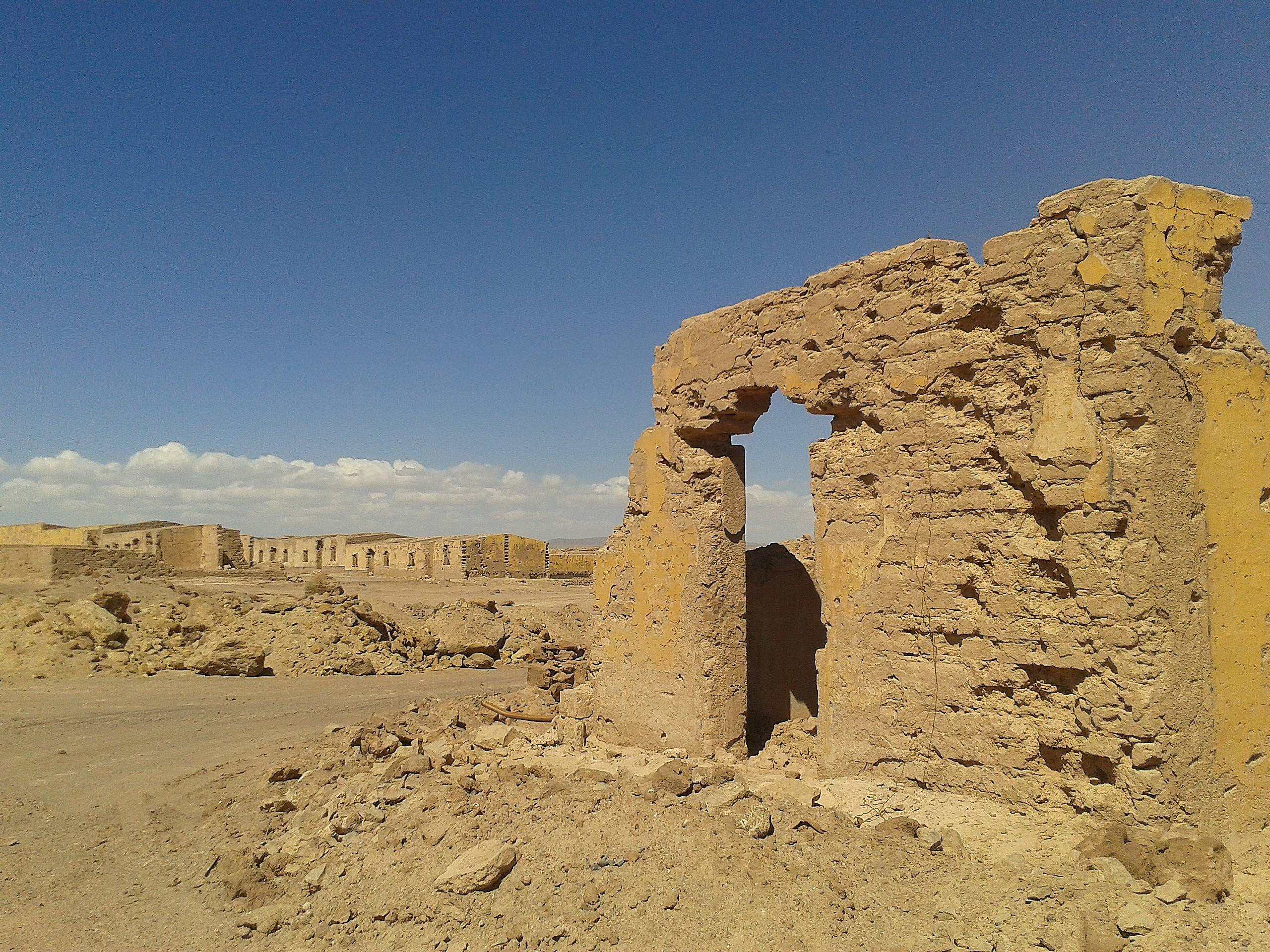 Ruinas de la Oficina Salitrera Francisco Puelma This is a photo of a national monument in Chile: 319